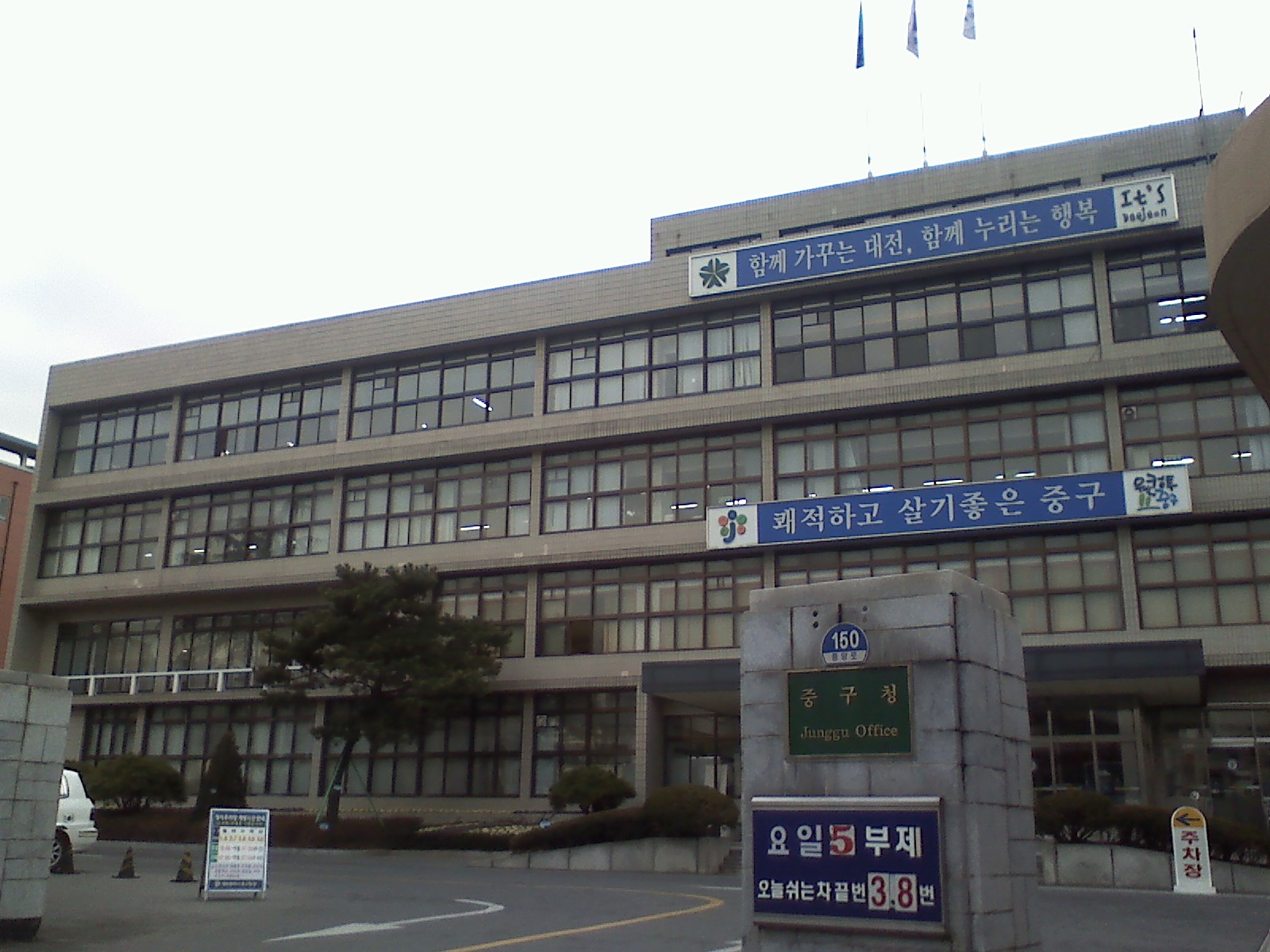 제가 직접 촬영한 사진입니다.